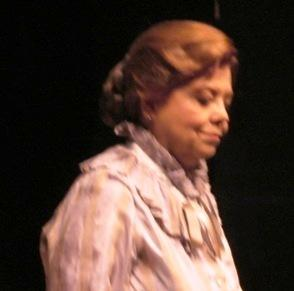 Ayşe Kökçü (Sarıkaya) Dört Kişilik Bahçe oyunu sonrasında seyirciyi selamlarken, 29 Ekim 2010, Harbiye Muhsin Ertuğrul Sahnesi